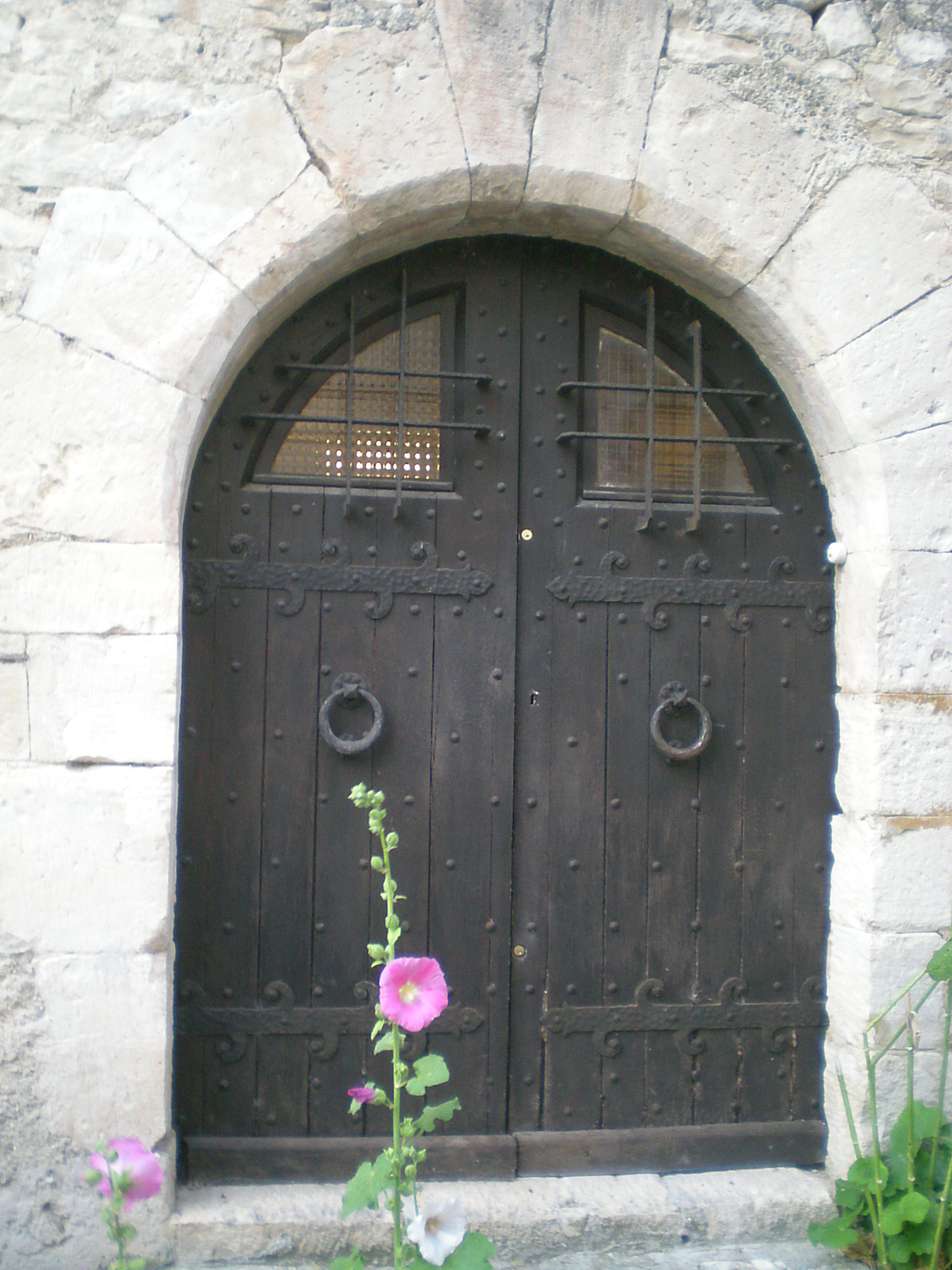 Description Porte de l'ancien prieuré de Fontienne Date4 September 2011SourcePhoto prise par l'auteurAuthorMichel HartensteinPermission (Reusing this file) Diffusion libre Porte de l'ancien prieuré de Fontienne